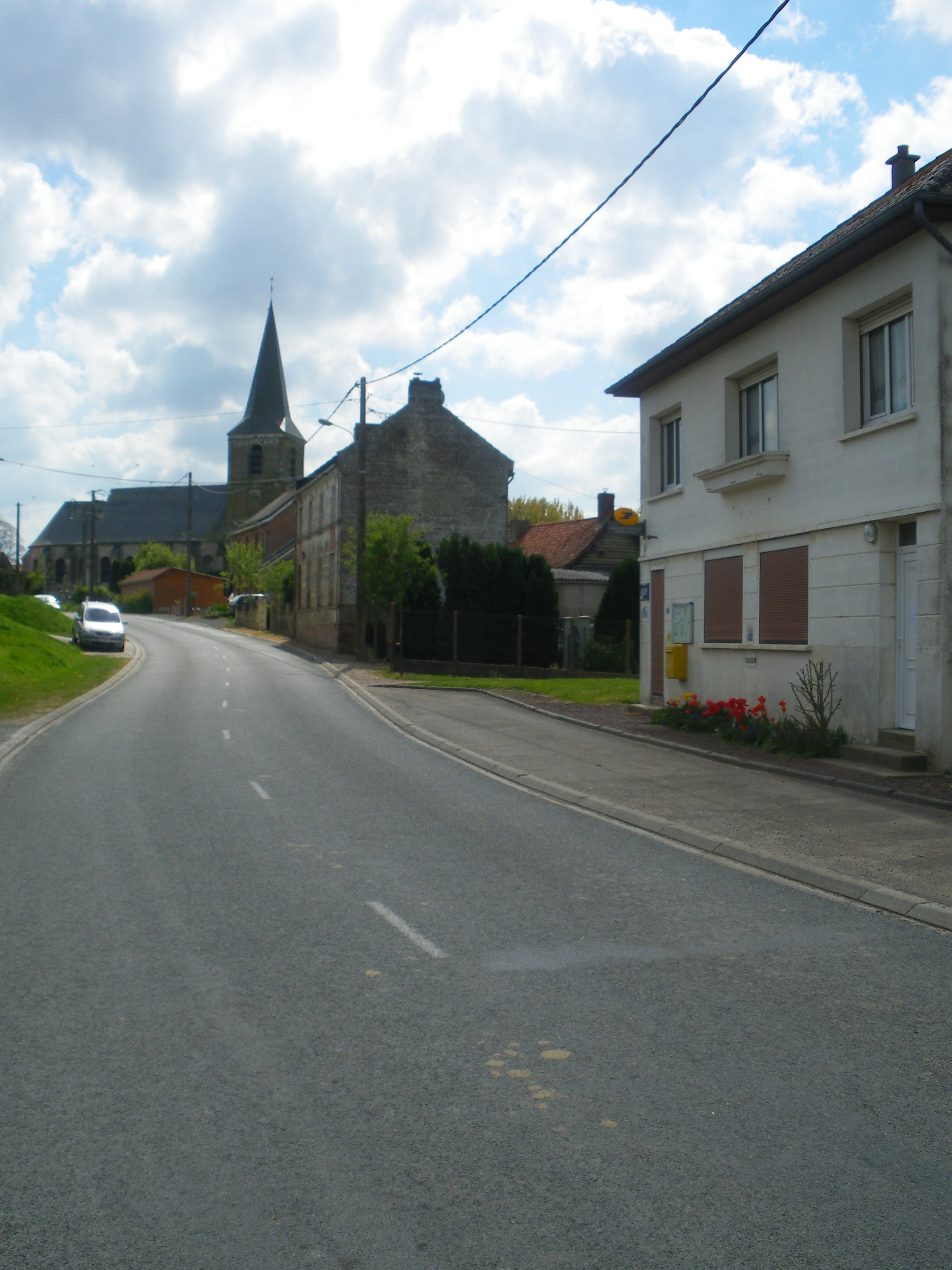 Vue de la commune de Fortel-en-Artois. Au fond se trouve l'église Saint-Pierre, à droite la mairie.